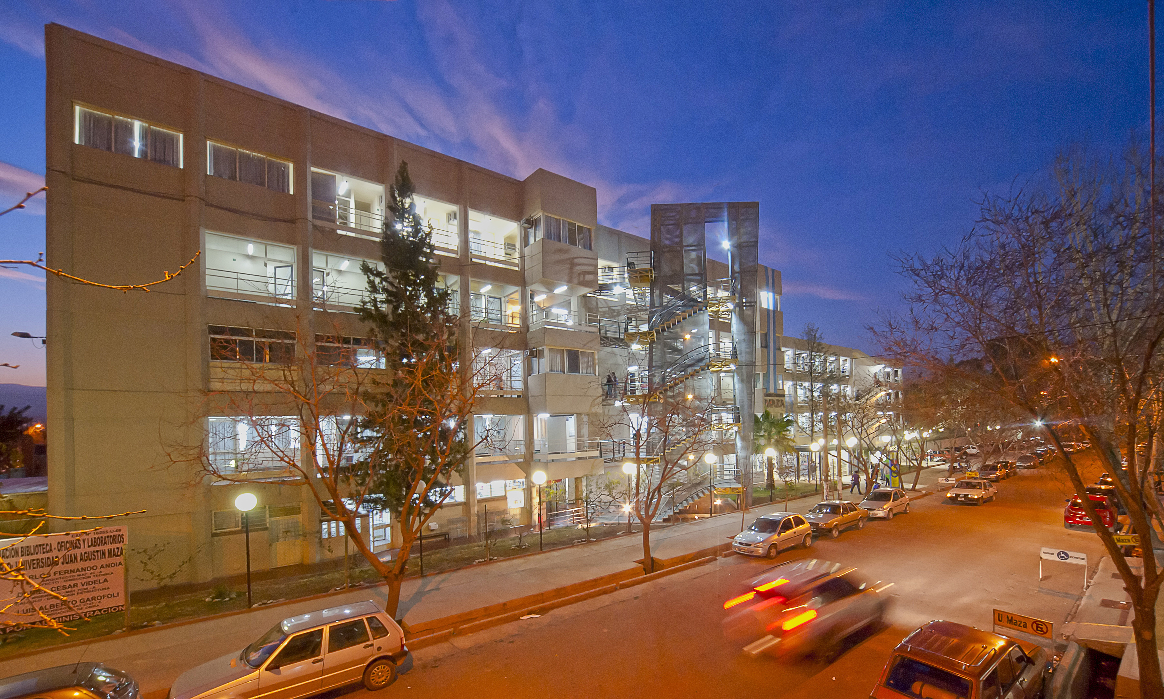 fachada